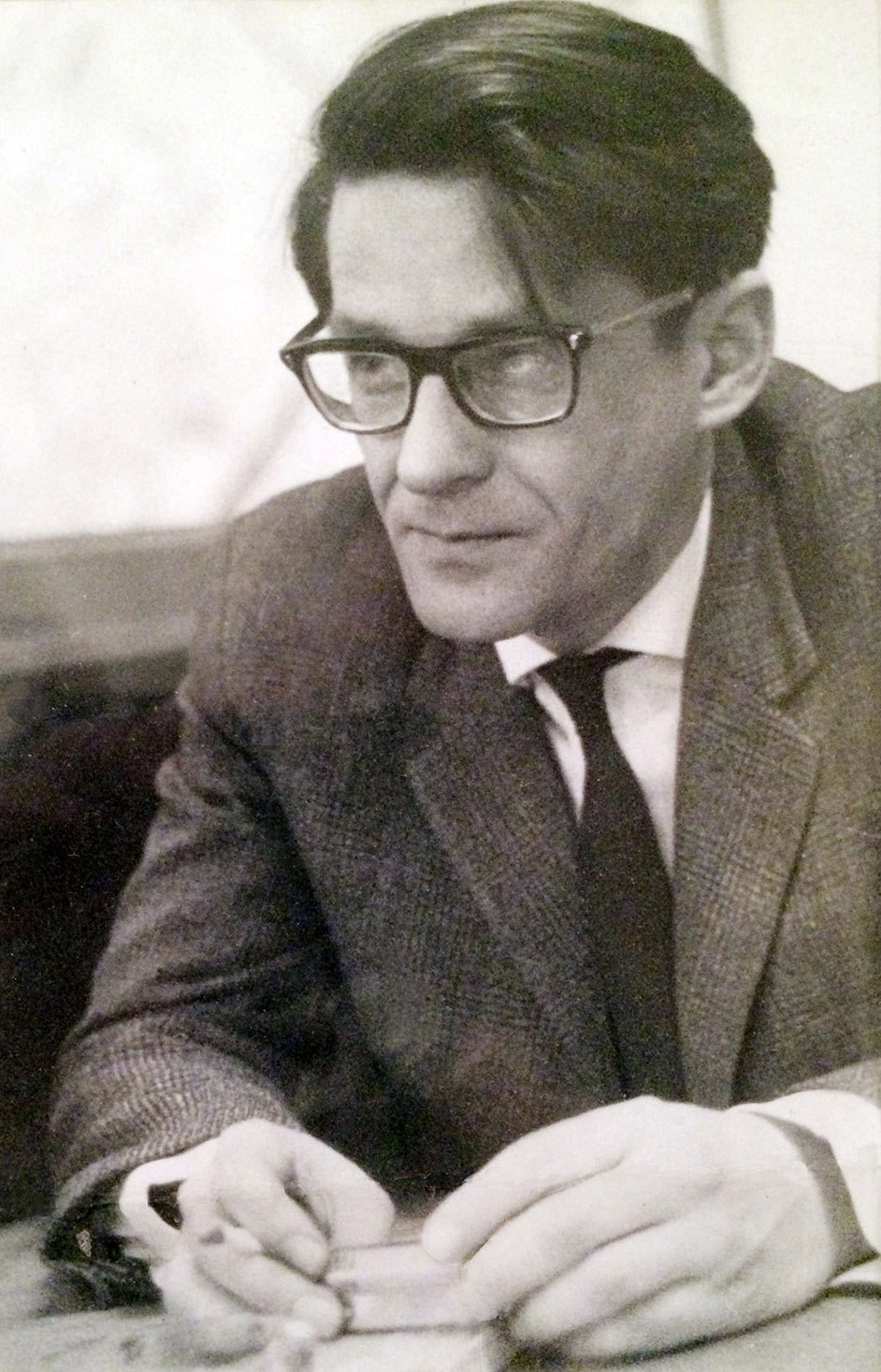 Српски (ћирилица): Владан Вучковић (Крагујевац, 24. јануар 1928. — Београд, 6. октобар 2006), био је инжењер електротехнике, доктор наука, професор универзитета, директор Центра за аутоматику и регулацију у Институту „Никола Тесла“ у Београду и предавач на Електротехничким факултетима у Београду, Нишу и Новом Саду. Srpski (latinica): Vladan Vučković (Kragujеvac, 24. januar 1928. — Bеograd, 6. oktobar 2006), bio jе inžеnjеr еlеktrotеhnikе, doktor nauka, profеsor univеrzitеta, dirеktor Cеntra za automatiku i rеgulaciju u Institutu „Nikola Tеsla“ u Bеogradu i prеdavač na Elеktrotеhničkim fakultеtima u Bеogradu, Nišu i Novom Sadu.